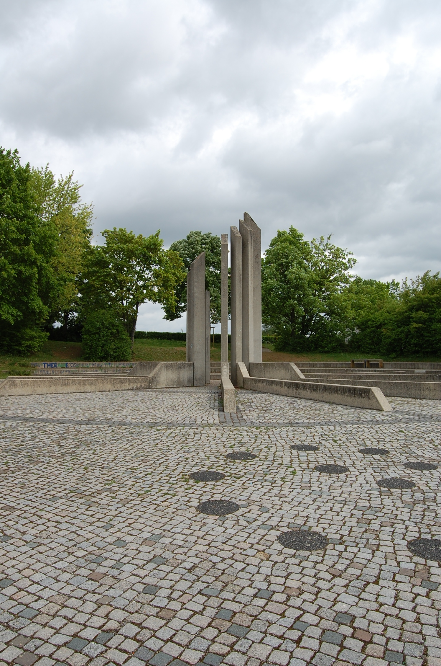 Skulptur auf dem Schulhof des Hölderlin-Gymnasiums Nürtingen